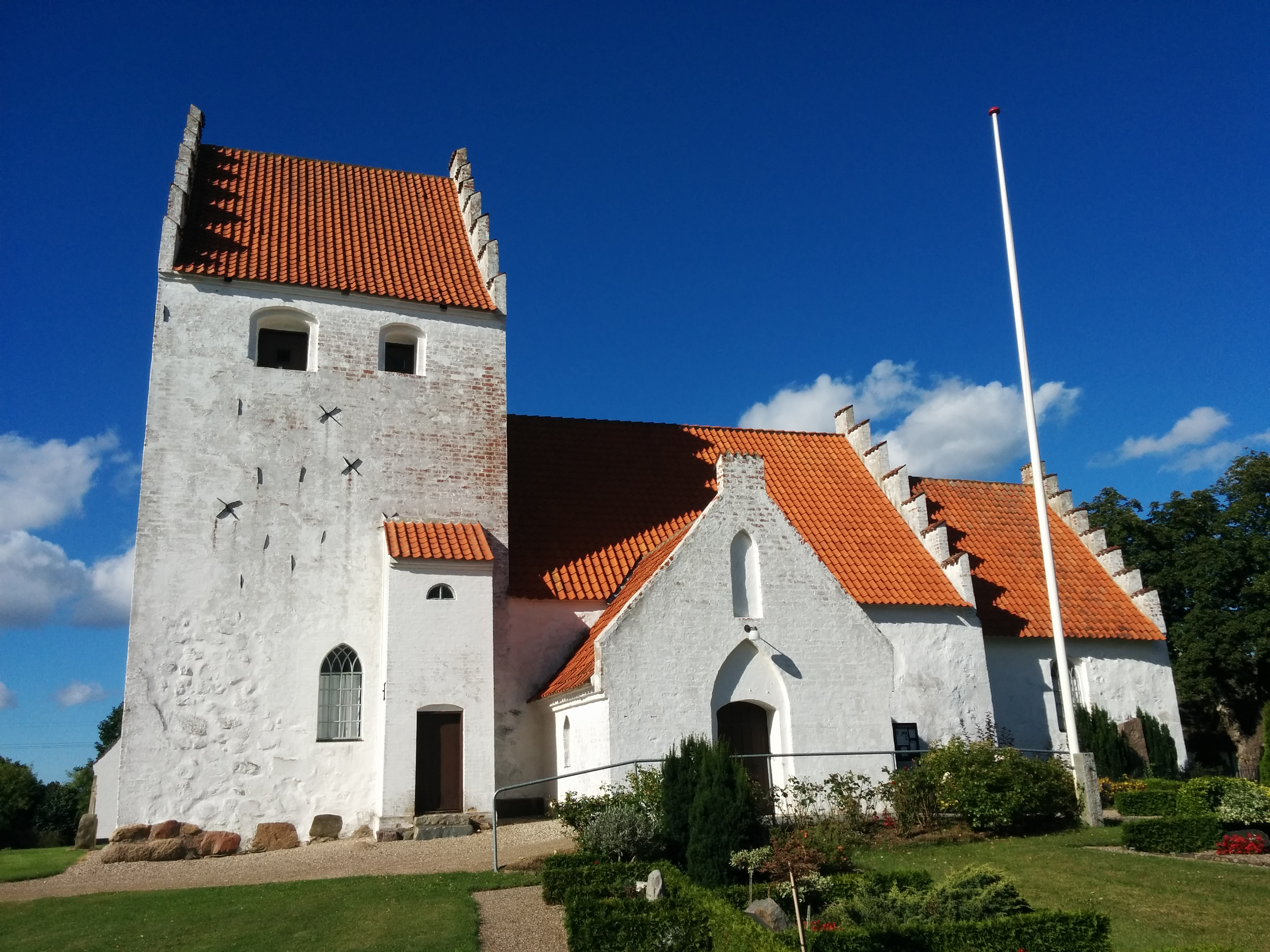 Kullerup Kirke fra sydsydvest